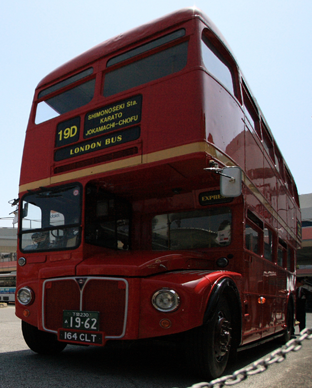 @ ShimonosekiCity, Yamaguchi, Japan.